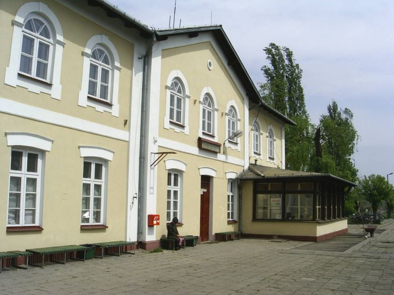 Dworzec kolejowy w Międzyrzecu Podlaskim